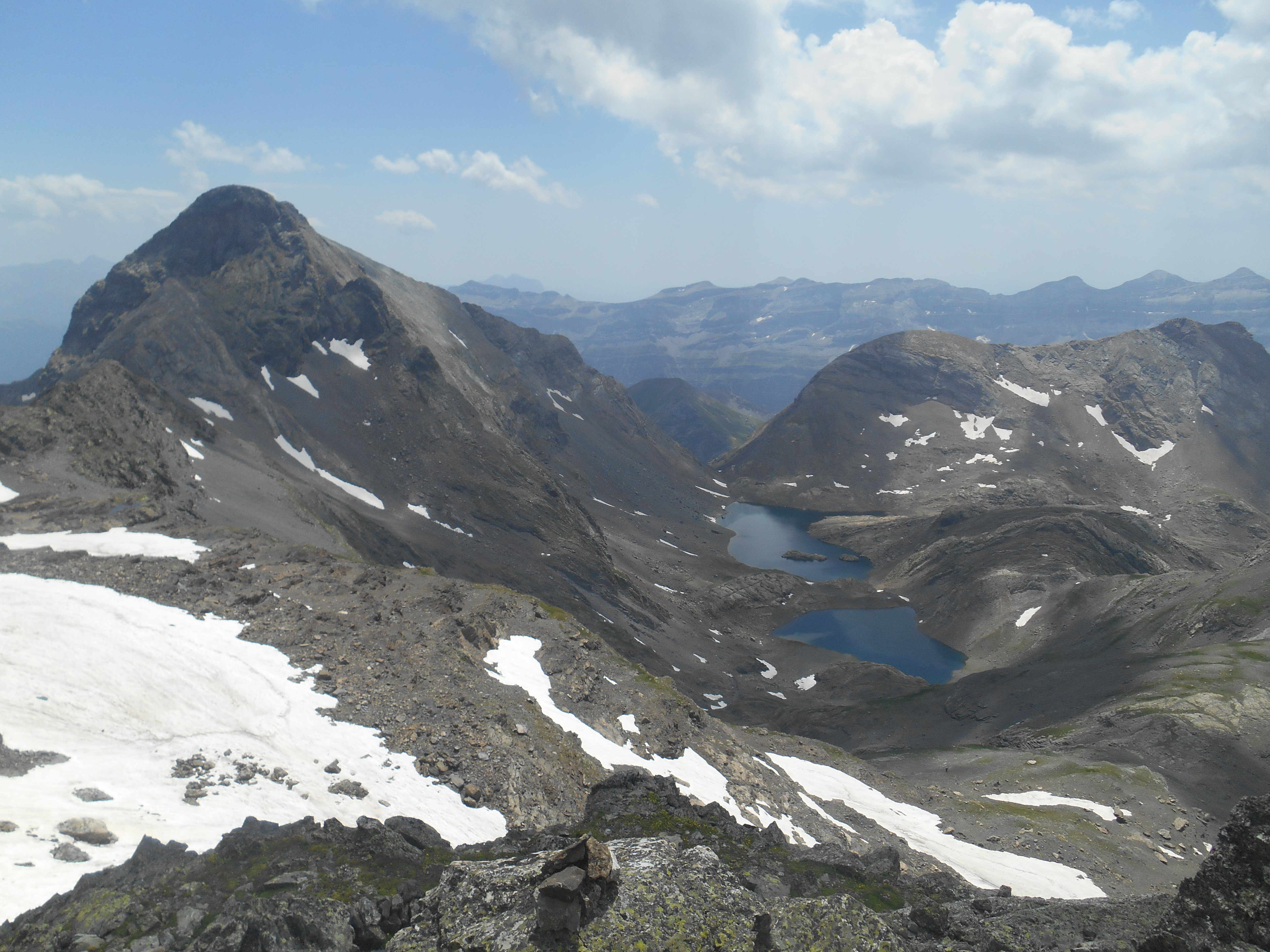 Face nord du Pic de Robiñera depuis le pic de la munia, juillet 2016, avec à droite les lacs de la Munia